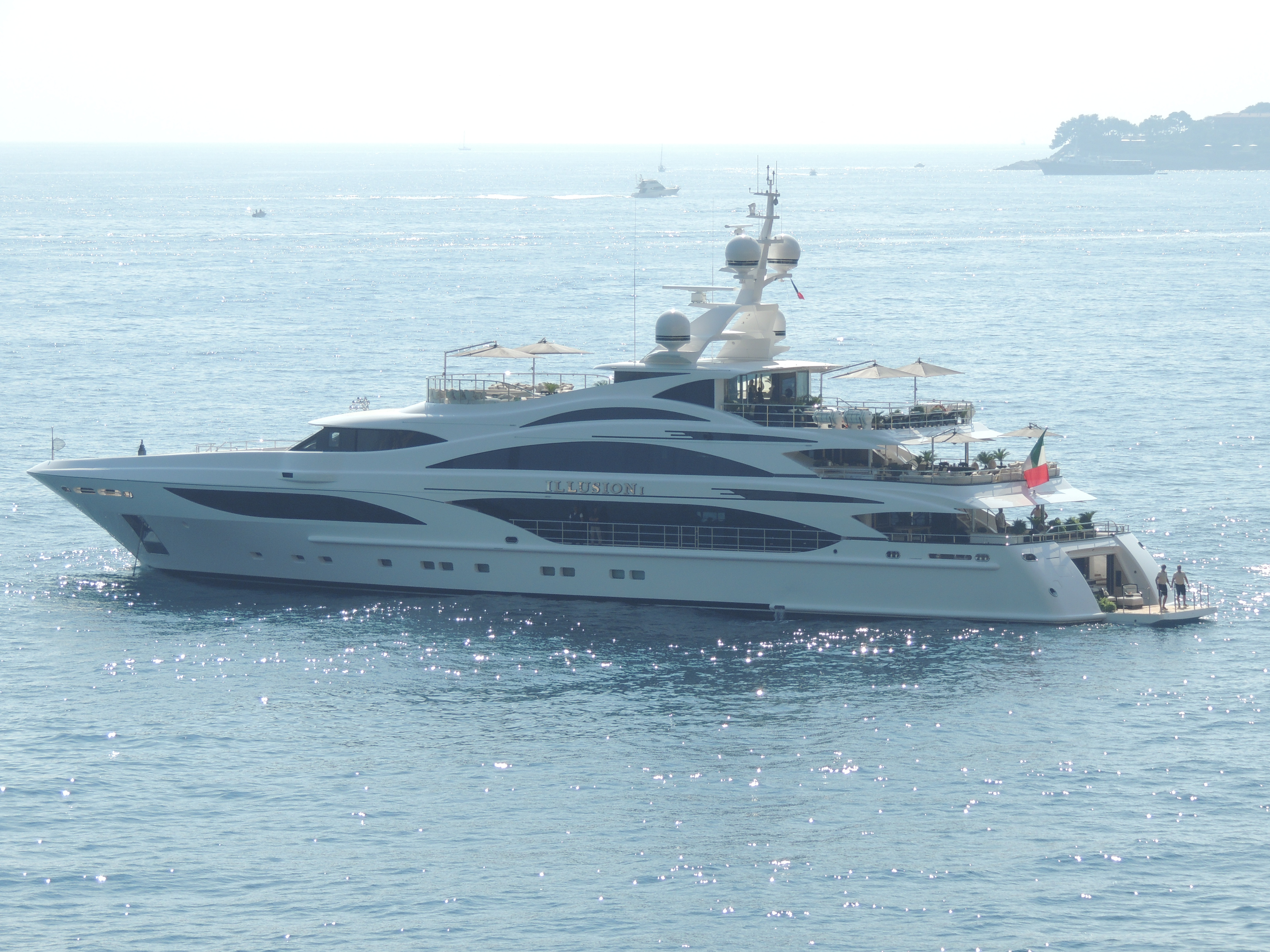 Illusion Yacht